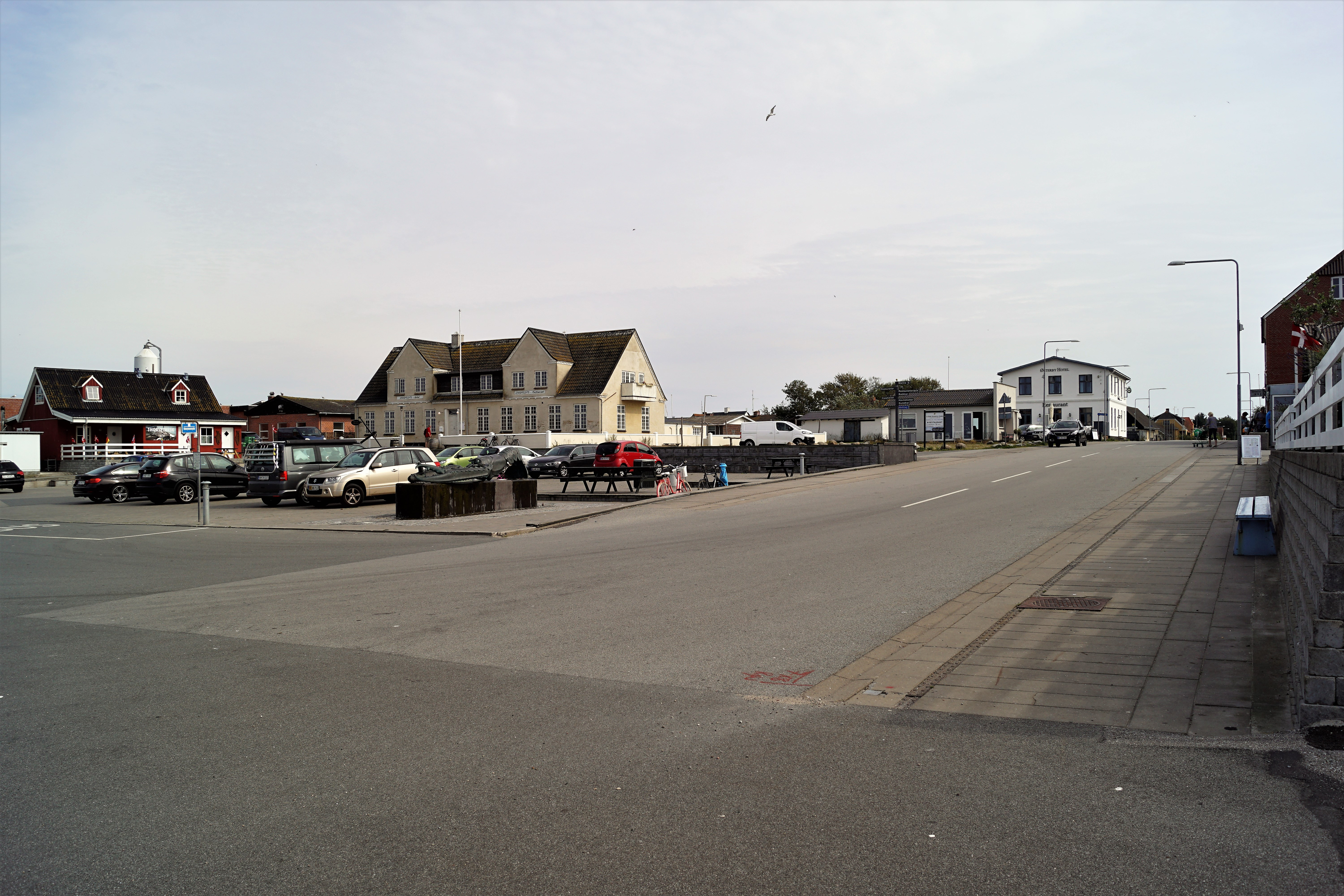 Østerby Havn, torv og kro